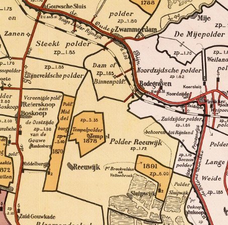 polder Reeuwijk